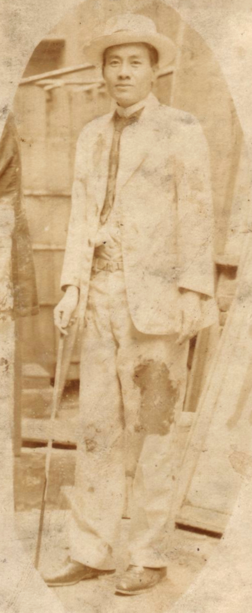 蔣渭水遭異議者擲泥土